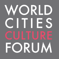 Логотип форума